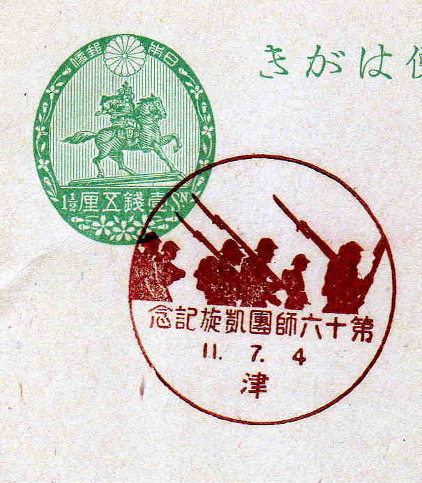 昭和11年7月4日付けの津郵便局が使用した「第16連隊凱旋記念」の記念郵便印